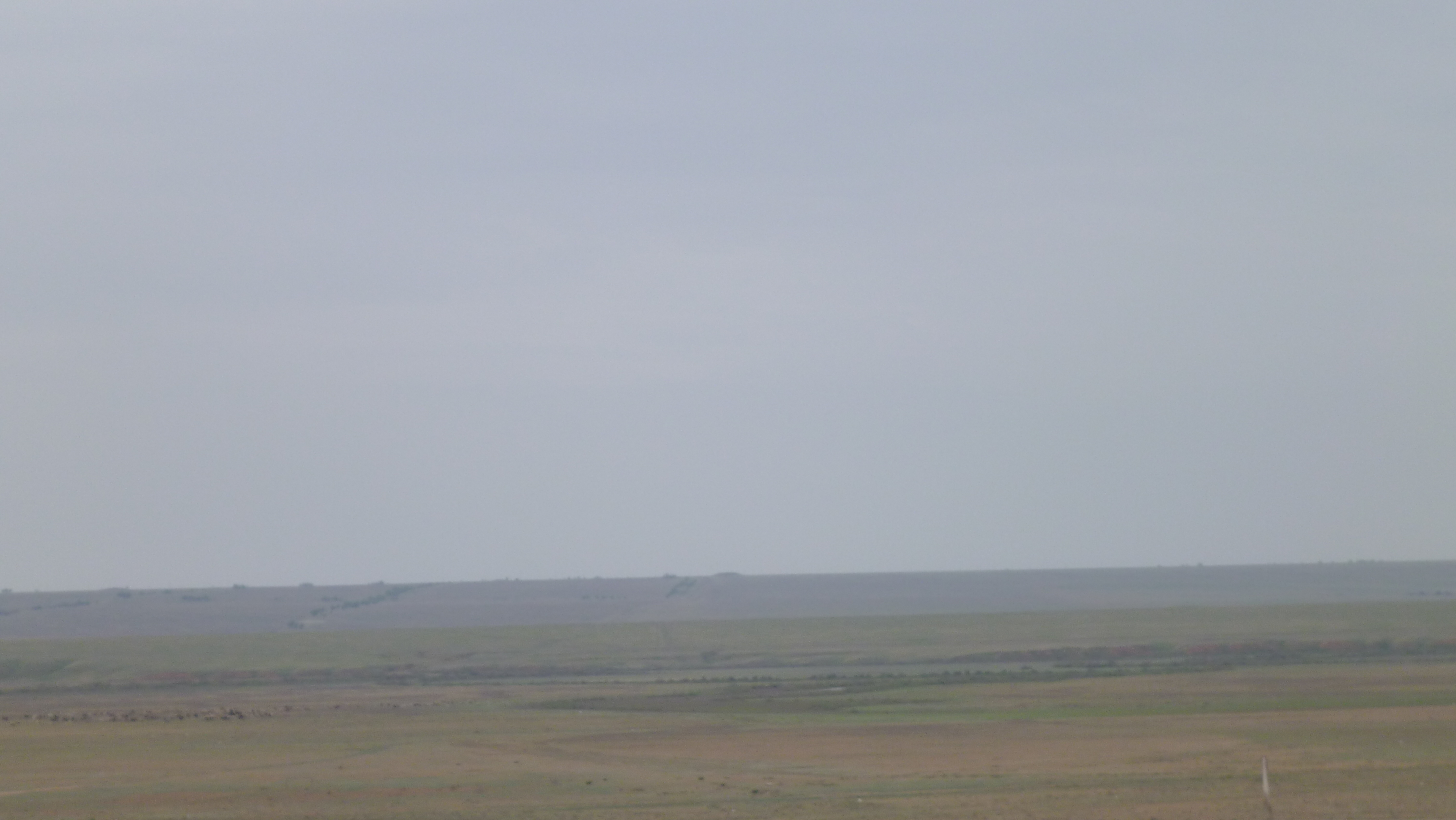 Долина реки Яшкуль, близ посёлка Ики-Чонос, Целинный район, Калмыкия